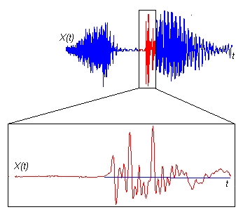 Aparato Fonador Humano